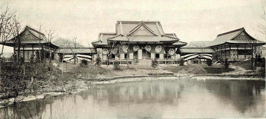 シカゴ万国博覧会(1893年)の日本館「鳳凰殿」正面